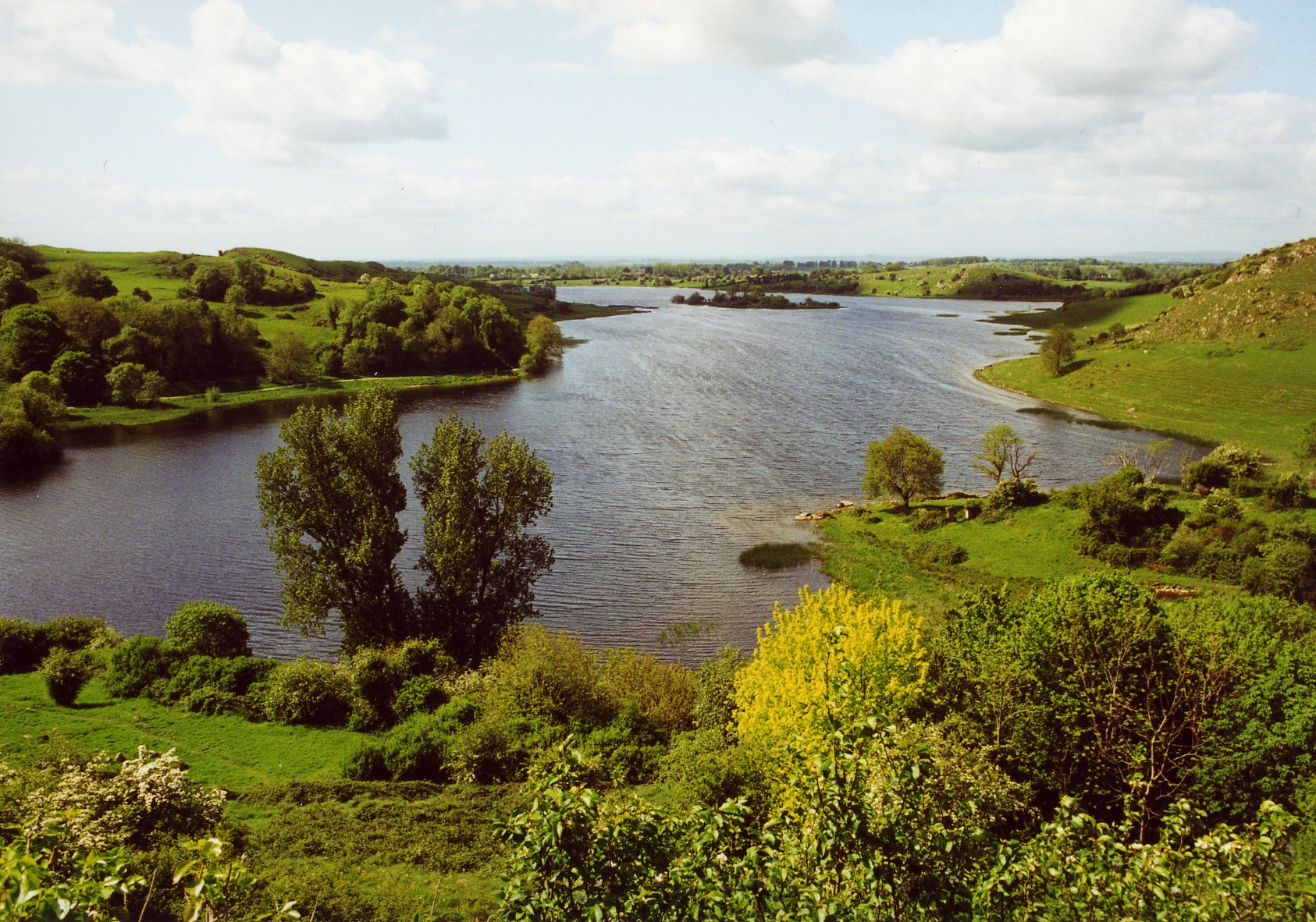 Blick über den Lough Gur